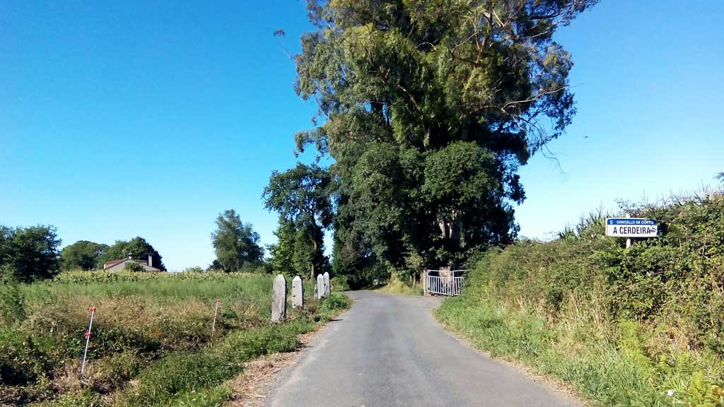 Vista da Cerdeira, Curtis.